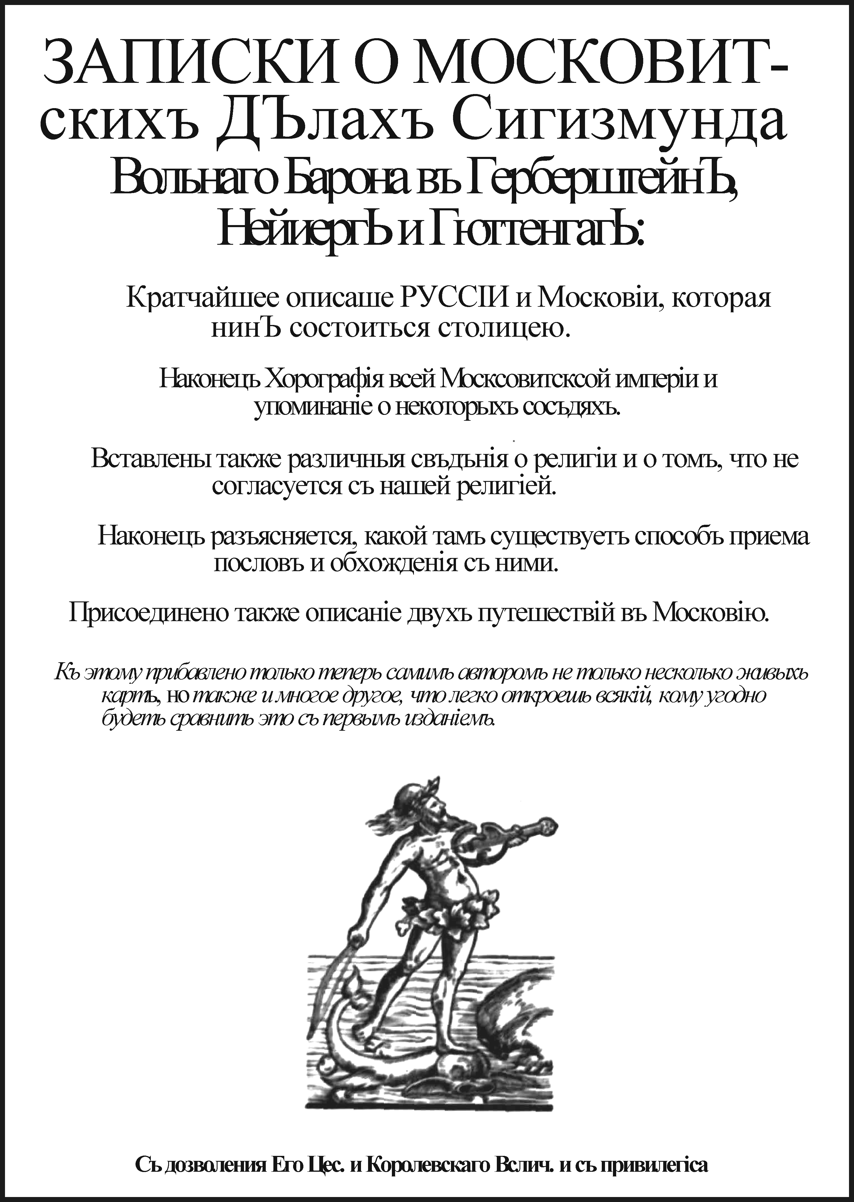 Обложка книги Герберштейна о путешествии в Московию.